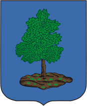 Герб Оргеєва 1826 року